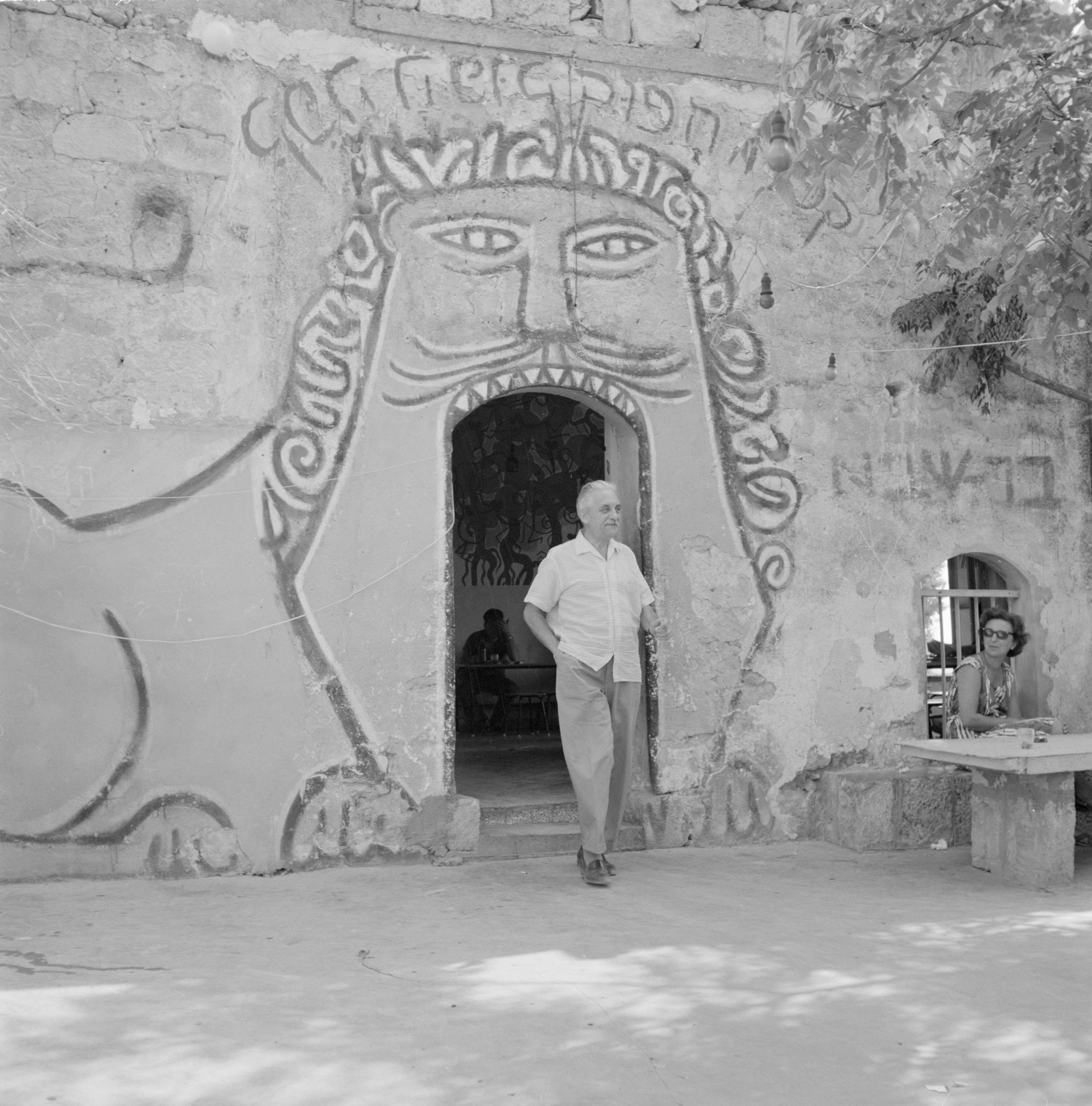 Collectie / Archief : Fotocollectie Van de Poll Reportage / Serie : Israël 1964-1965. Ein Hod Beschrijving : Burgemeester Marcel Janco verlaat een kunstcentrum in Ein Hod. Annotatie : Het dorp Ein Hod werd in 1953 een kunstenaarskolonie op initiatief van Marcel Janco, een gerenommeerd Dada-kunstenaar. Datum : 1964 Locatie : Ein Hod, Israël Trefwoorden : beeldend kunstenaars, burgemeesters, kunstenaarskolonies, stichters Persoonsnaam : Janco, Marcel Fotograaf : Poll, Willem van de, [onbekend] Auteursrechthebbende : Nationaal Archief Materiaalsoort : Negatief (zwart/wit) Nummer archiefinventaris : bekijk toegang 2.24.14.02 Bestanddeelnummer : 255-2755